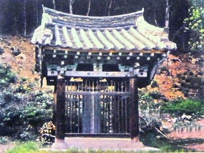 Thụ hàng môn (受降門).